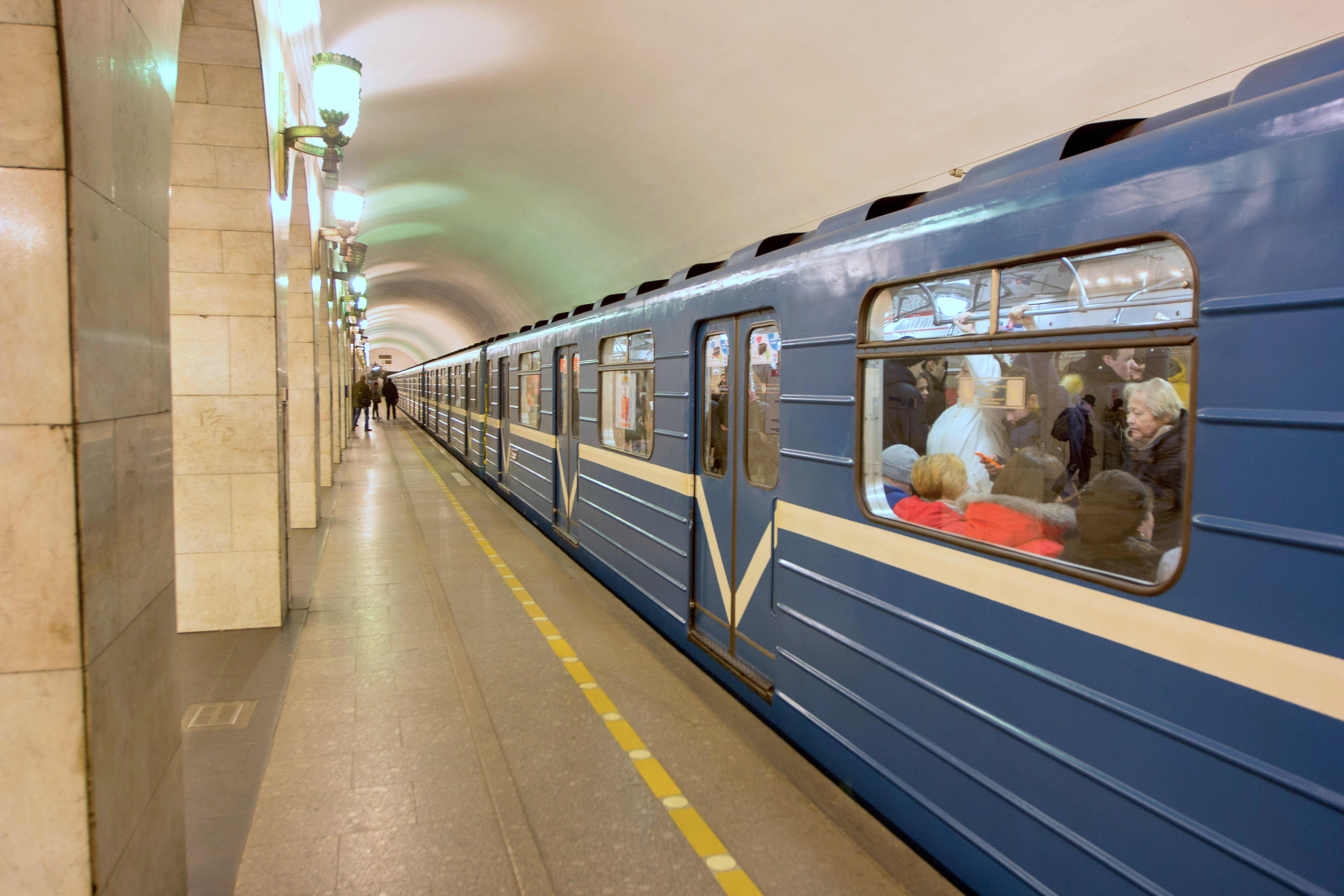 Vue de la station de métro Technologichesky (Lignes 1 et 2)- Platforme: Technologichesky metrostation 1 - du métro de Saint-Pétersbourg (Russie)